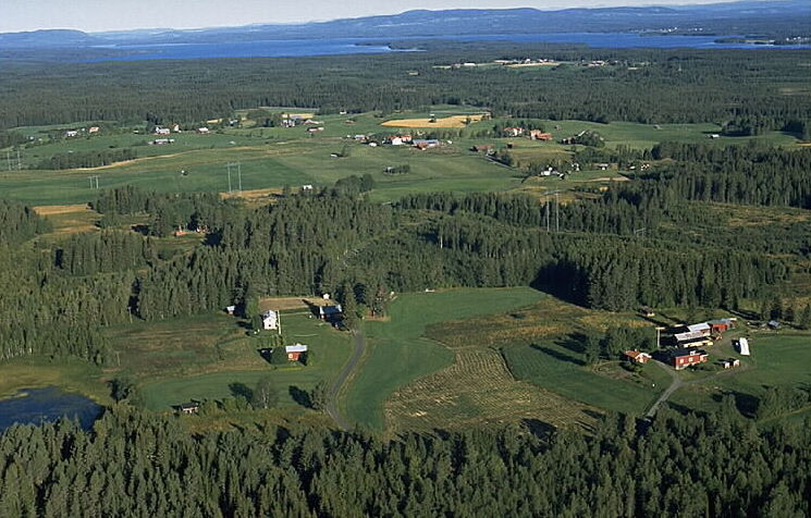 Motiv: Kälen Nyckelord: Flygbilder, Riksintressen Kategori: JordbruksbyKälen